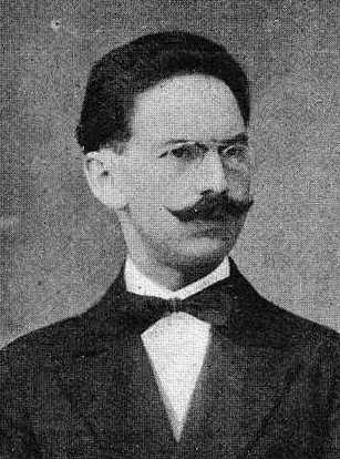 Luis Soto Menor, fotografía en Vida Gallega 1917